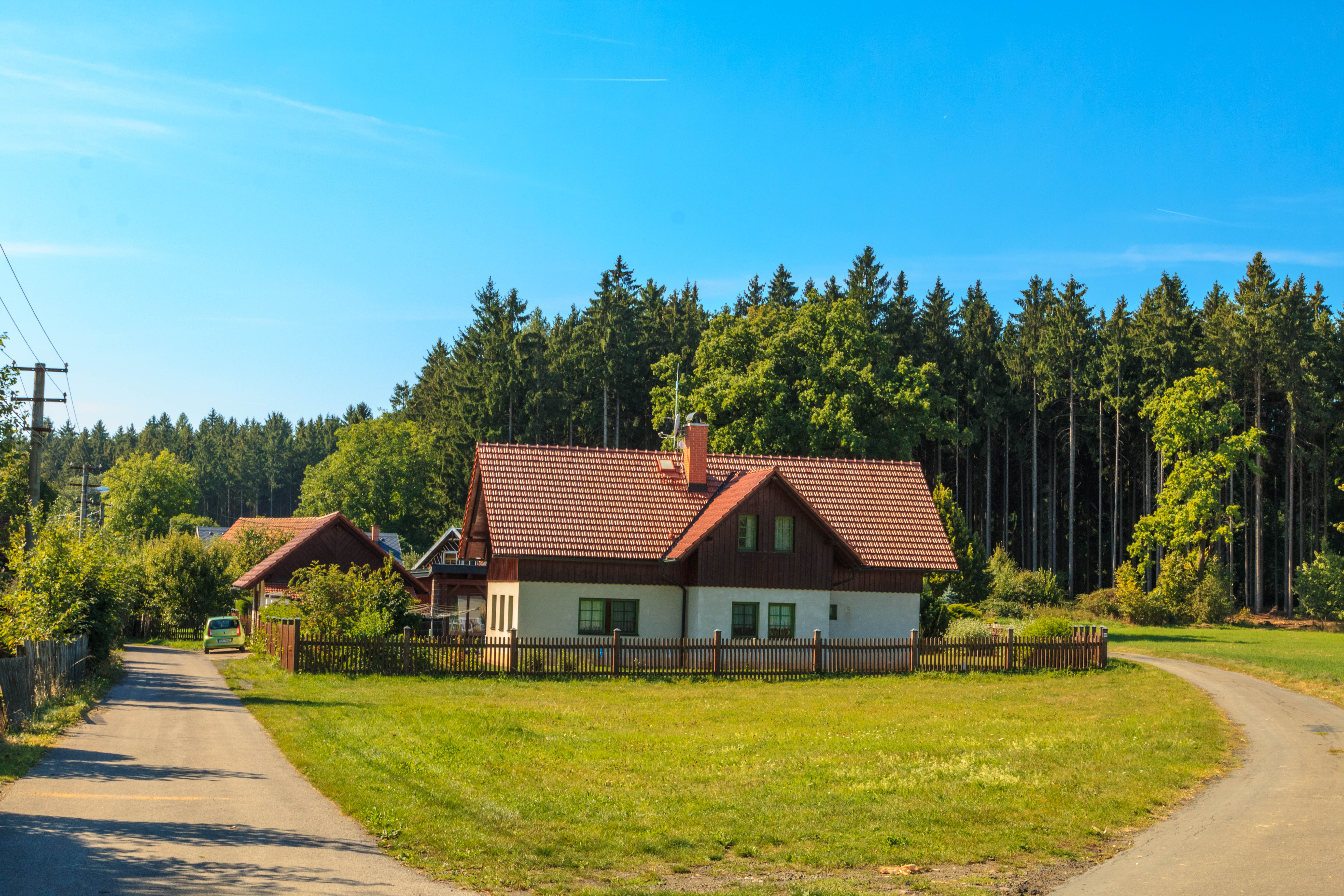 Křenovy - čp. 63